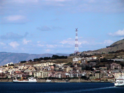 L'abitato di Pezzo ed il porto di Villa San Giovanni negli anni '90